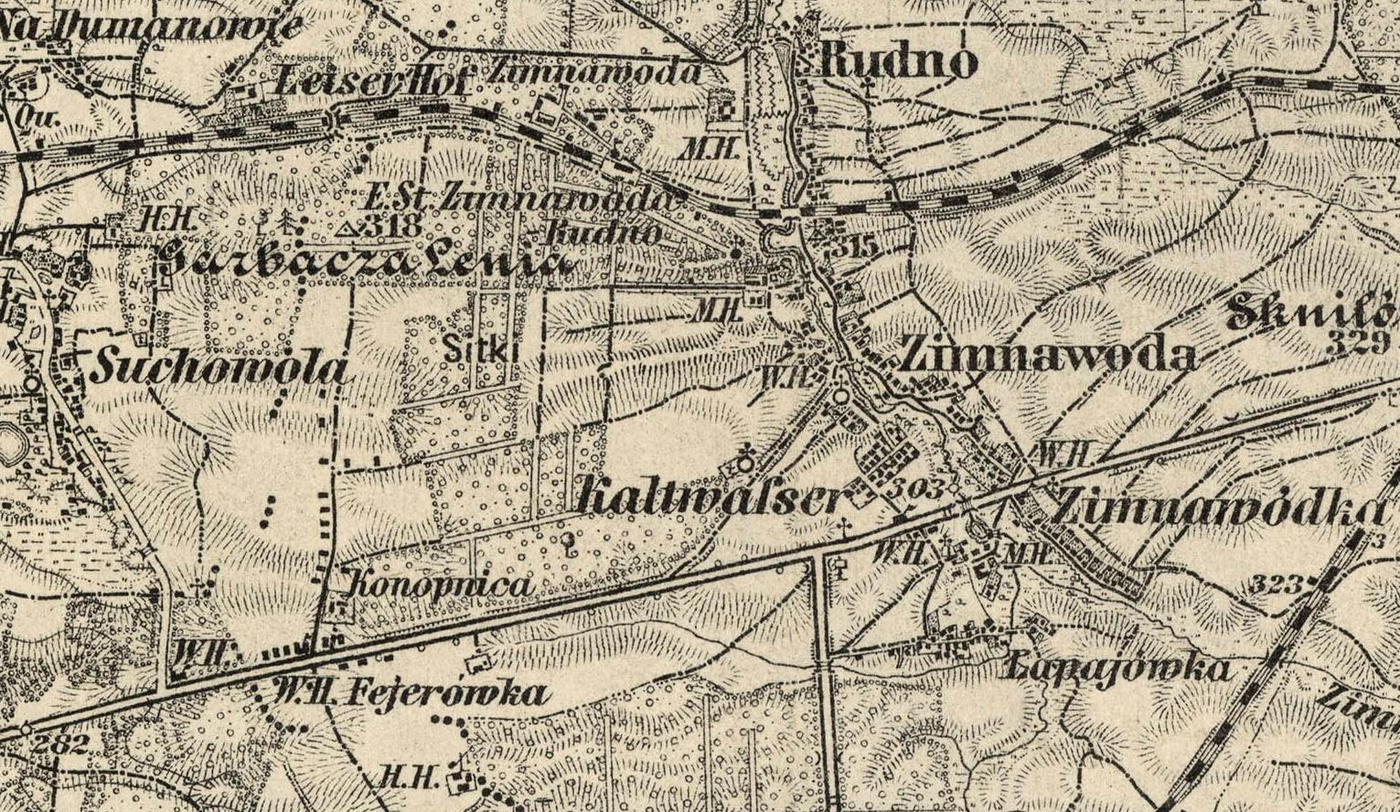 Карта дійсна на 1904 рік (мірила 1:75000)